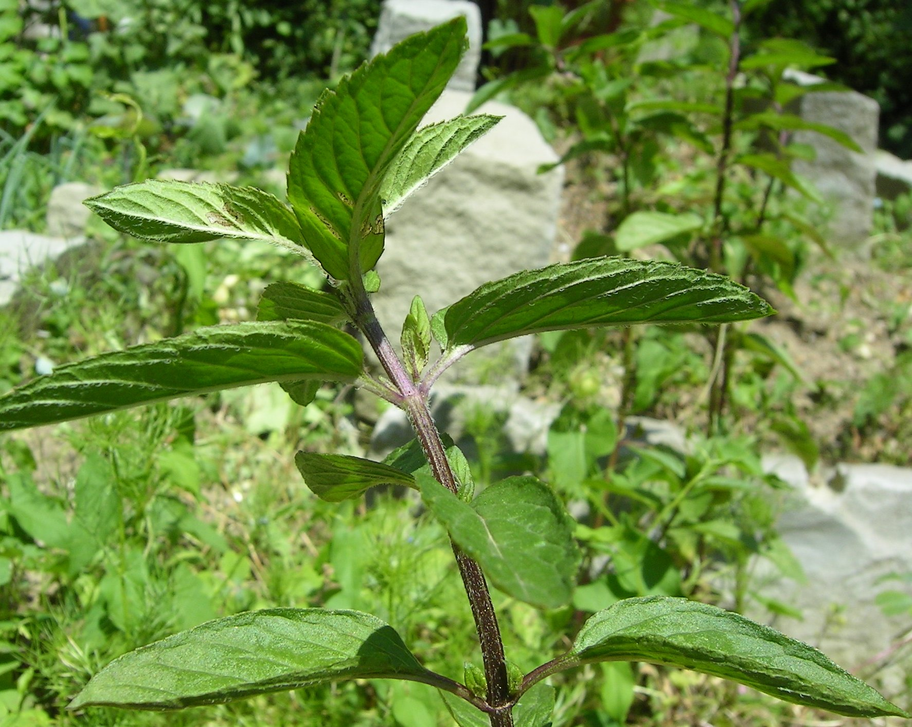 (en) Peppermint (Mentha piperata) (de) Stark schmeckende Pfefferminze (Mentha × piperata) Aufnahmeort: Schweiz, SG Bearbeitung: GIMP Zugeschnitten